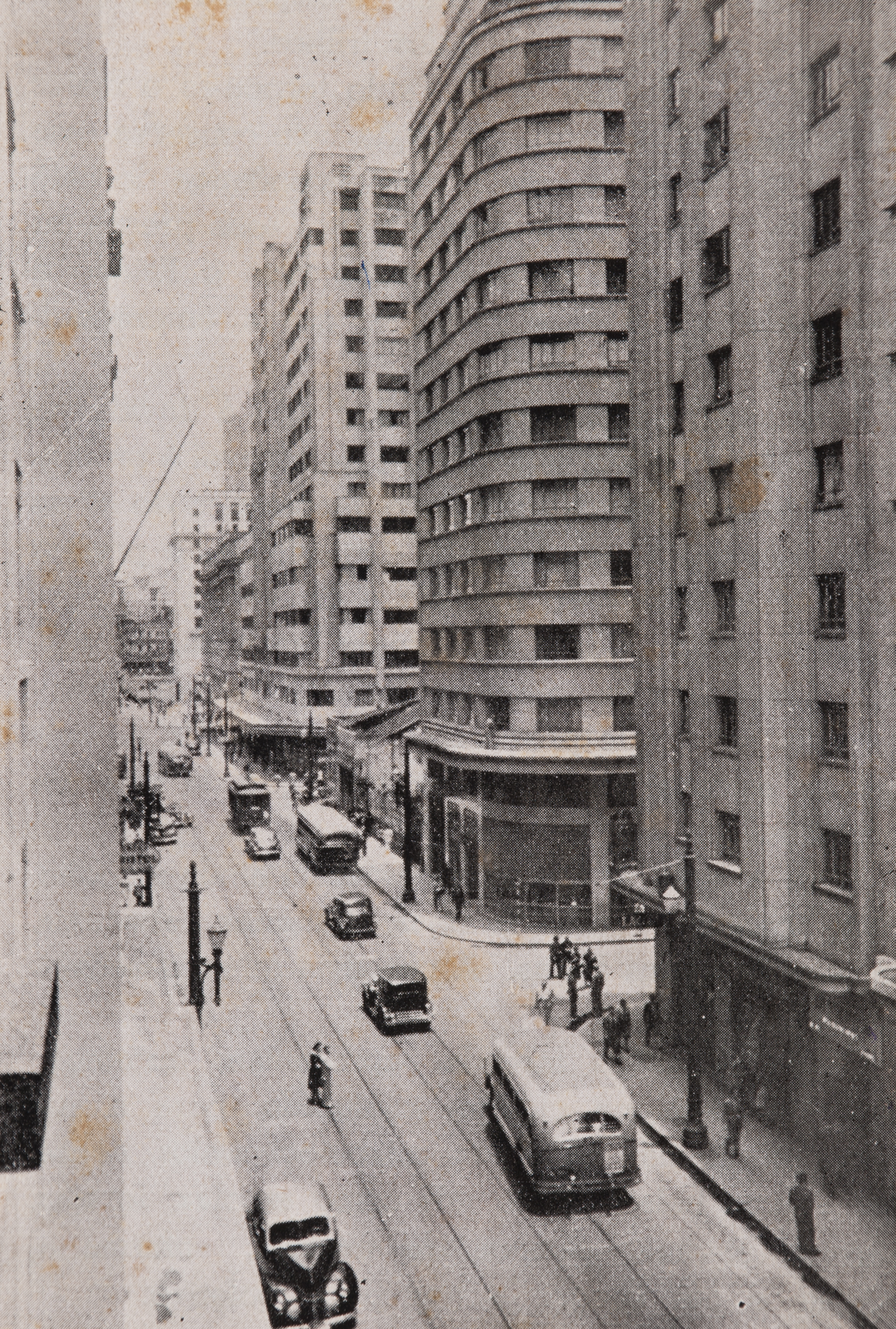 Obra que integra o acervo do Museu Paulista da USP. Coleção João Baptista de Campos Aguirra.